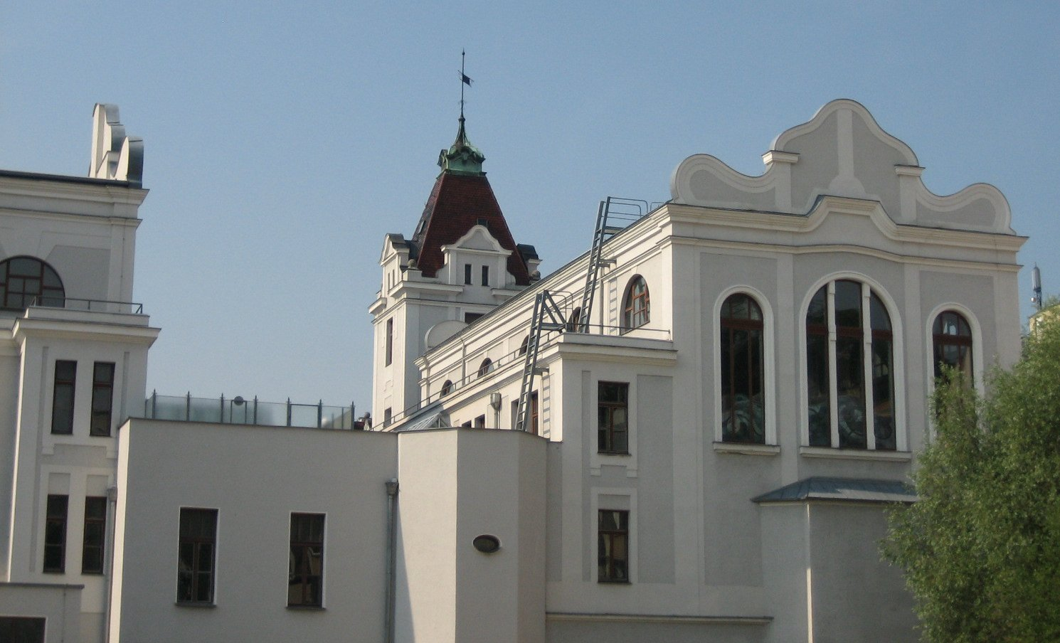 Altes Stadtbad in Augsburg, Außenansicht von Norden